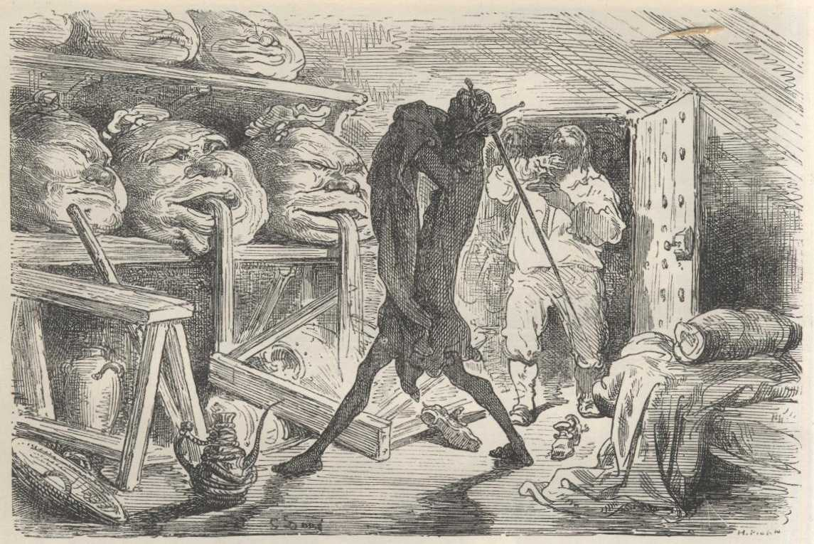 Gustave Doré, ilustração para "Dom Quixote" de Miguel de Cervantes